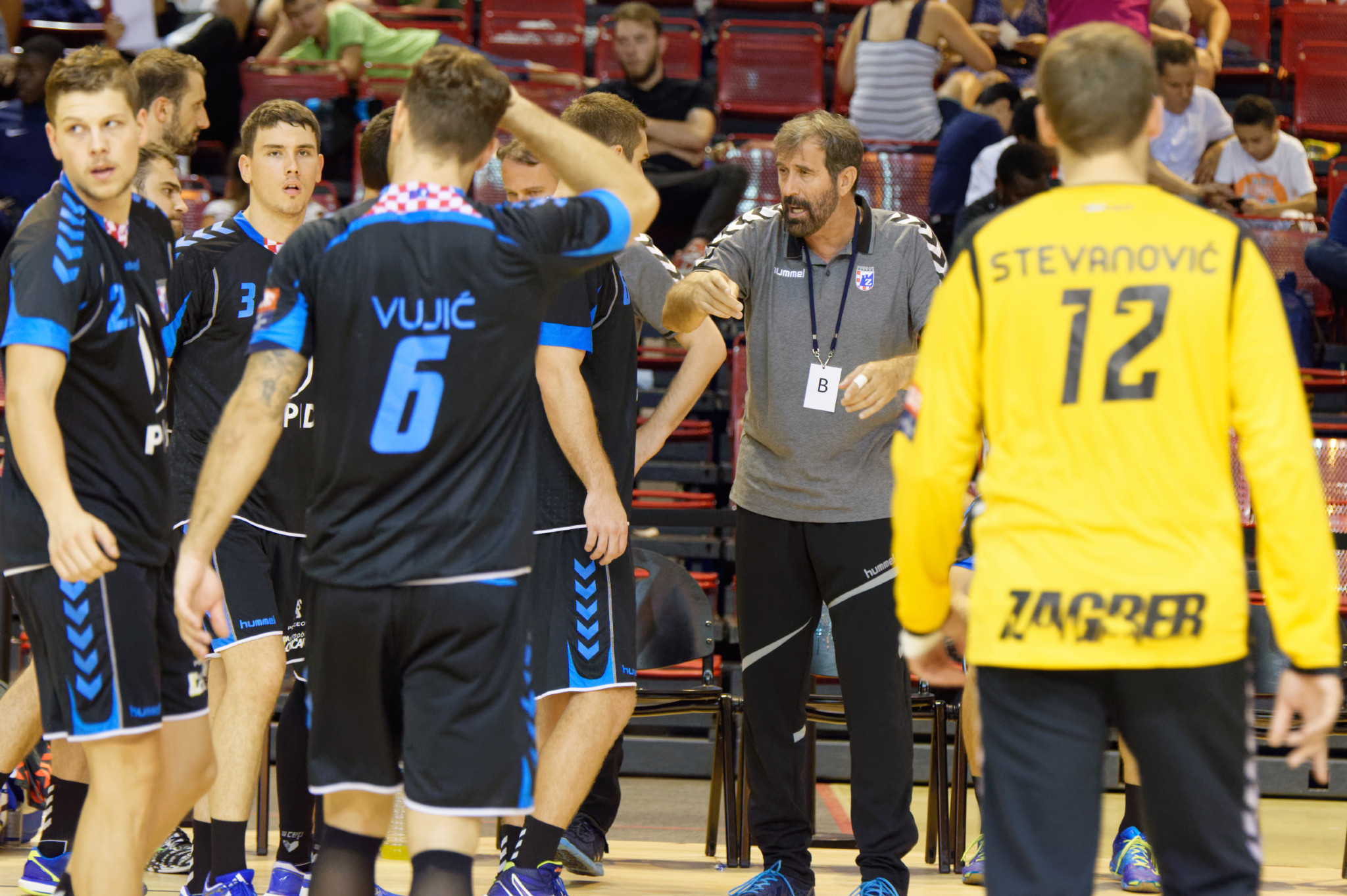 Rencontre du challenge Marrane 2016 entre l'US Dunkerque et les croates du RK Zagreb